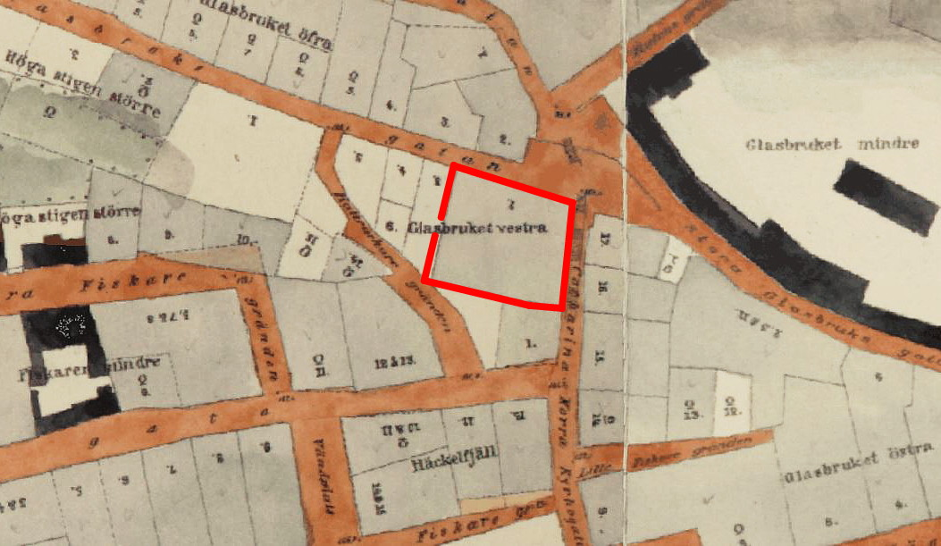 Del av Stockholmskarta visande fastigheten Glasbruket västra nr 2 (dagens Katarinabacken nr 1)